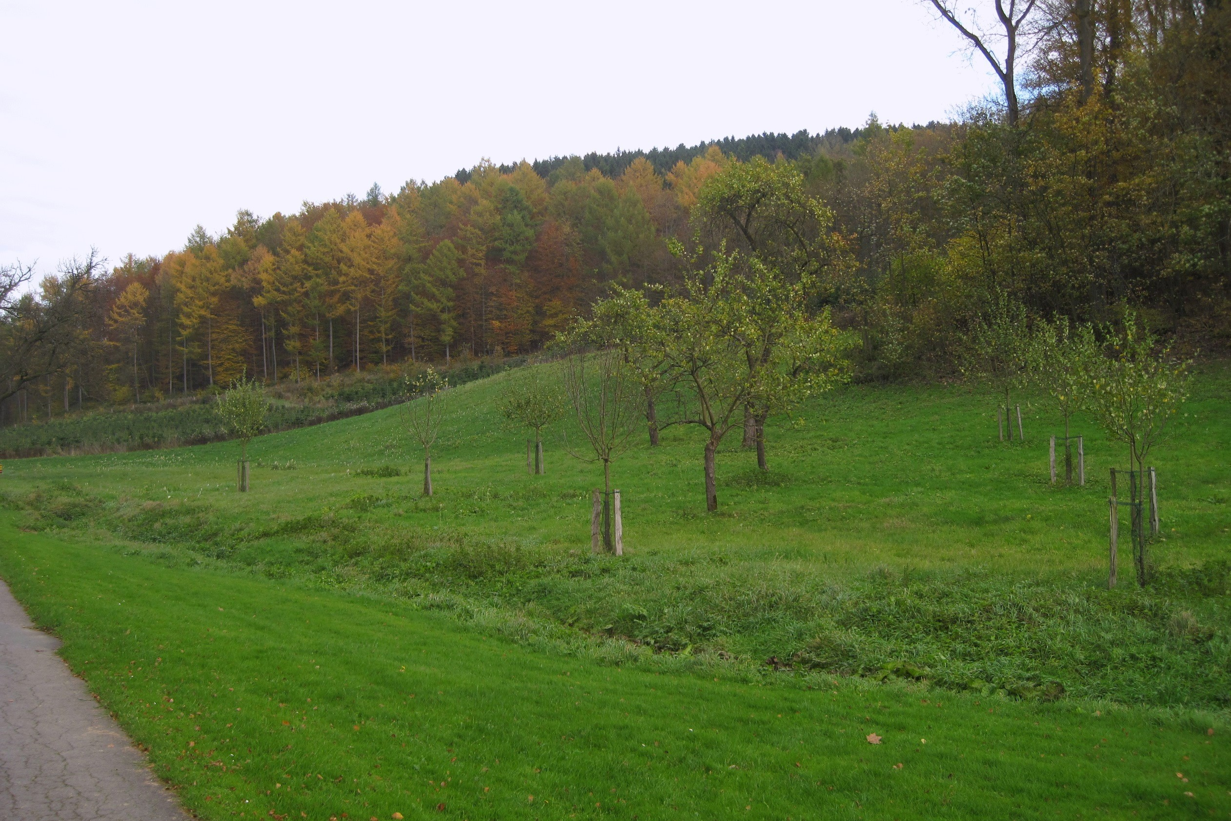 Naturschutzgebiet Am Schlehen, Plettenberg-Ohle, Brünninghausen.